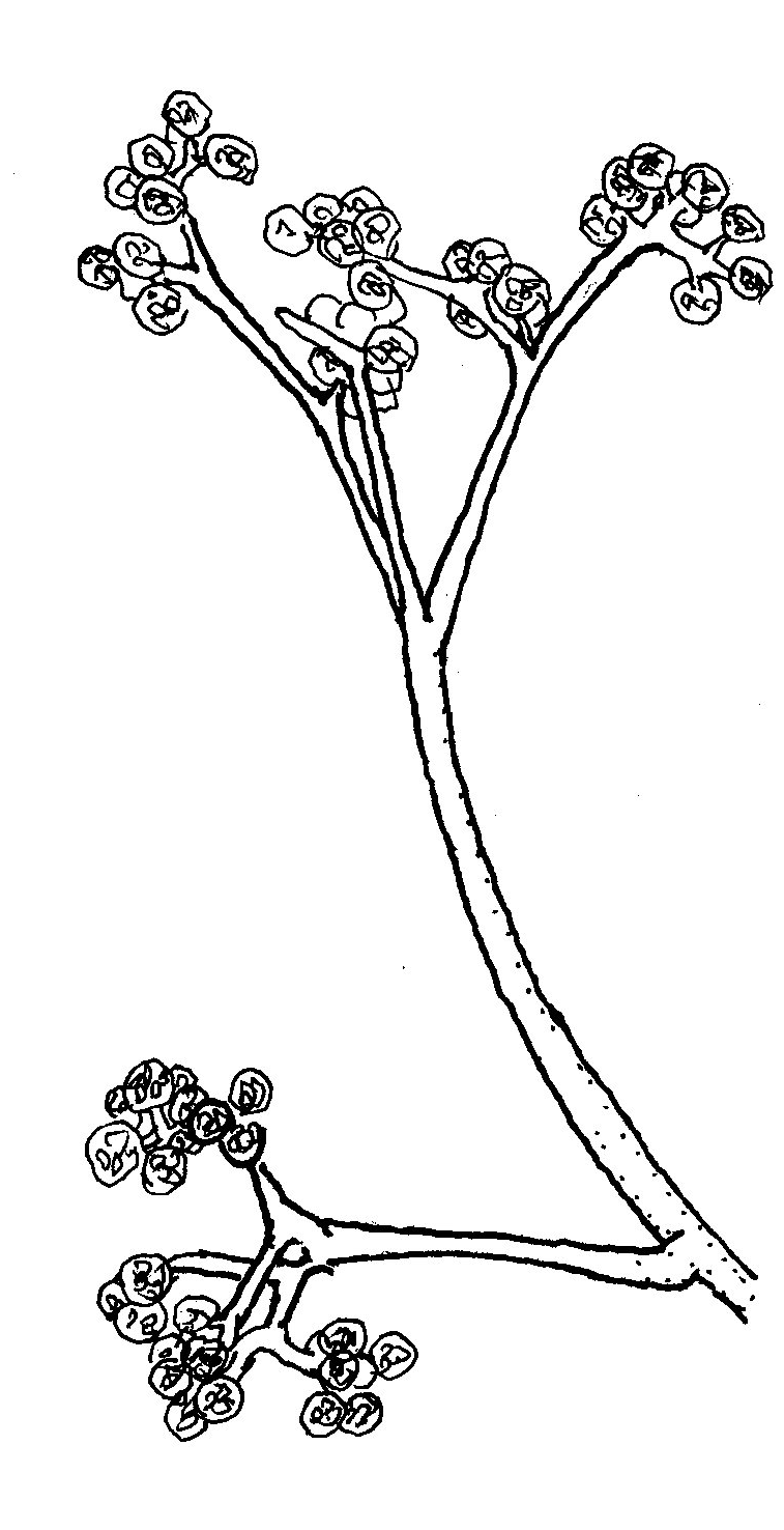 Ellisomyces anomalus Benny & Benjamin(1975)より模写